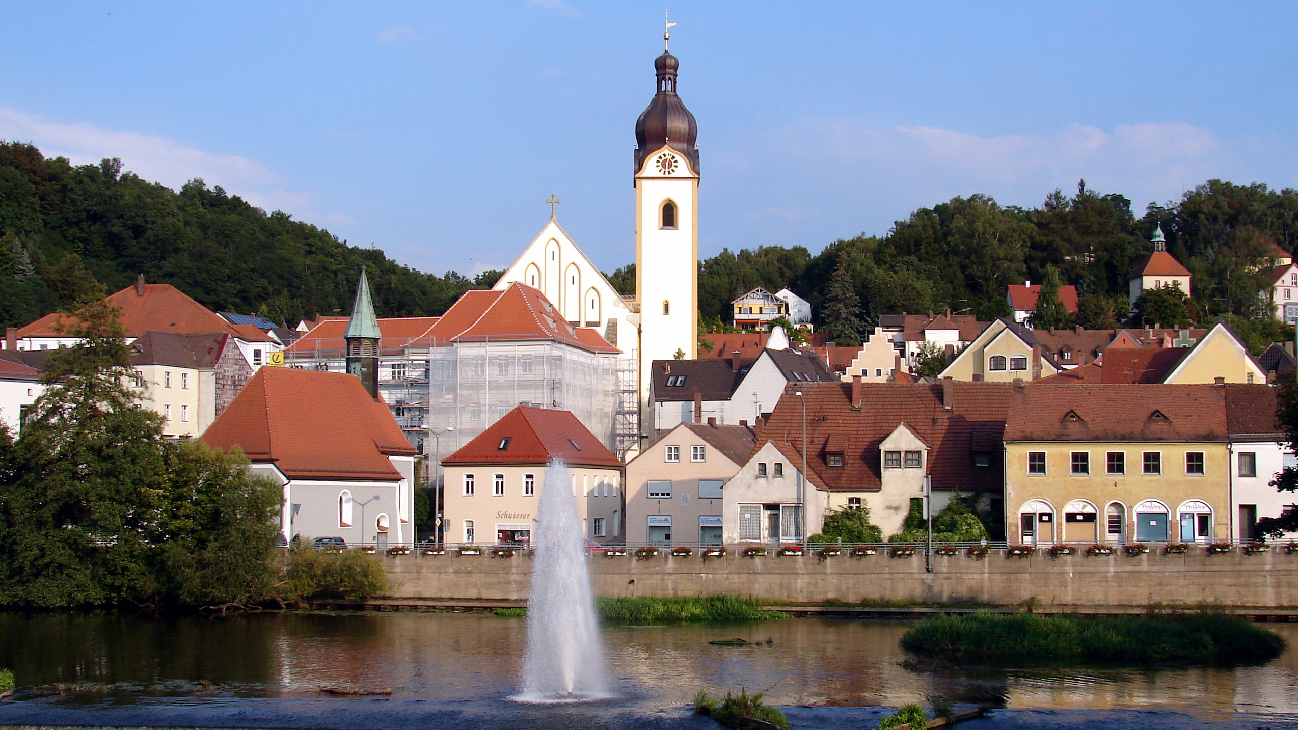 Schwandorf ist eine Große Kreisstadt im gleichnamigen Landkreis Schwandorf im Regierungsbezirk Oberpfalz in Bayern.